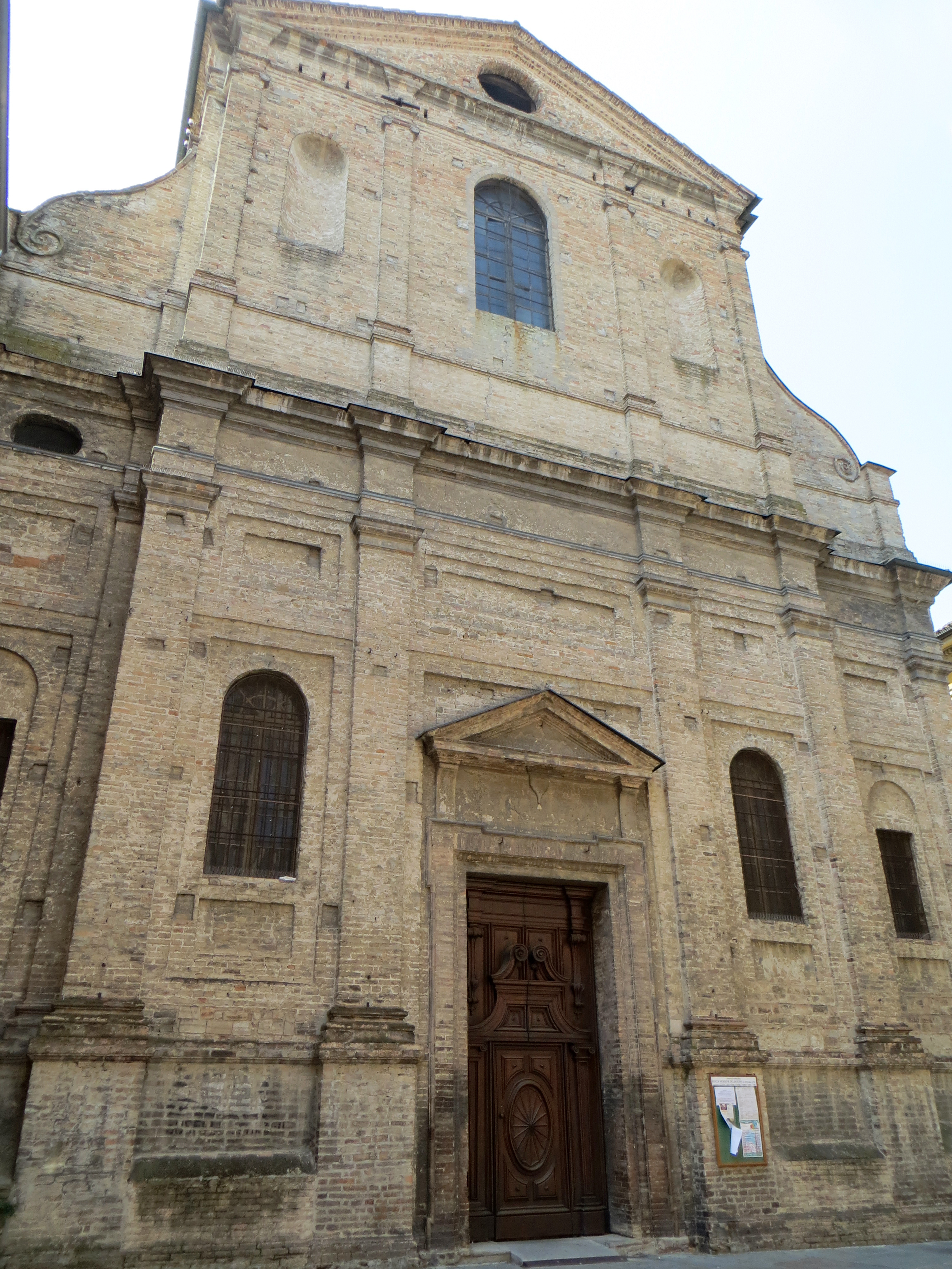 Chiesa di San Quintino (Parma) - facciata